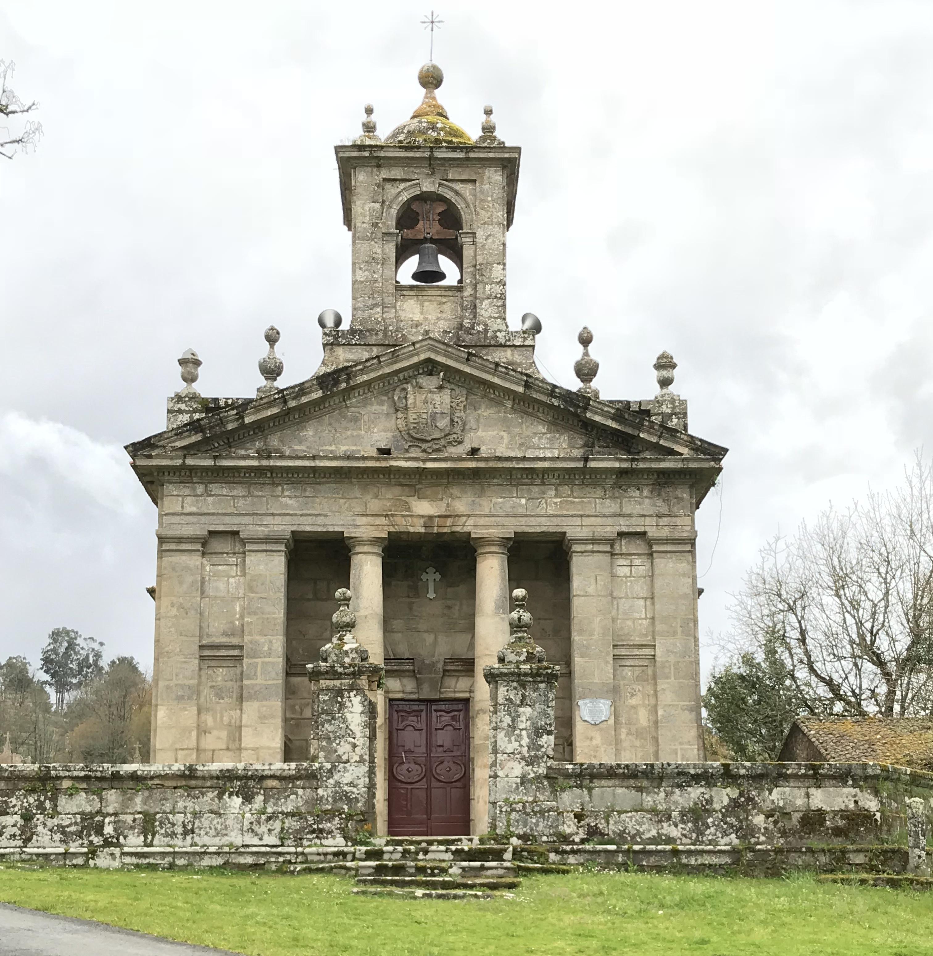 Igrexa de Santa Mariña de Ribeira, arquitectura neoclásica